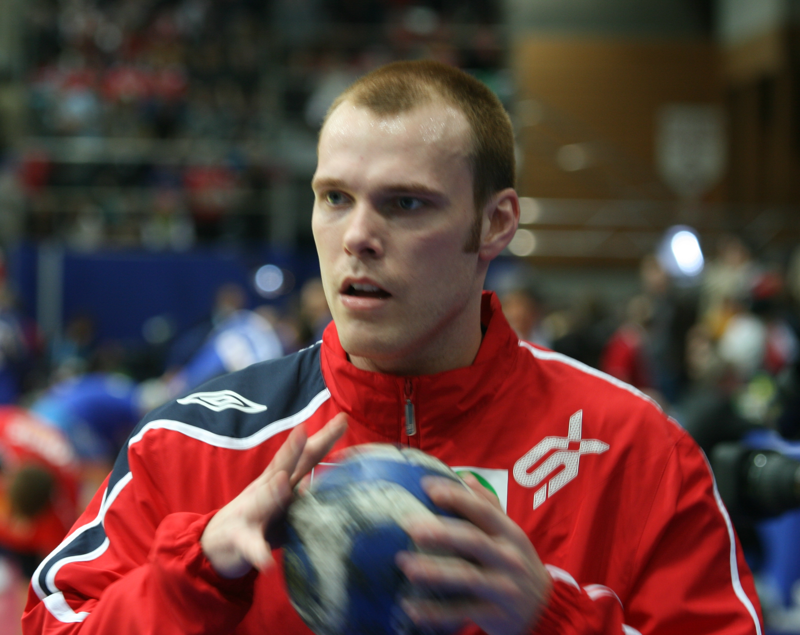 Thomas Skoglund, Norwegian handballer, in Stavanger